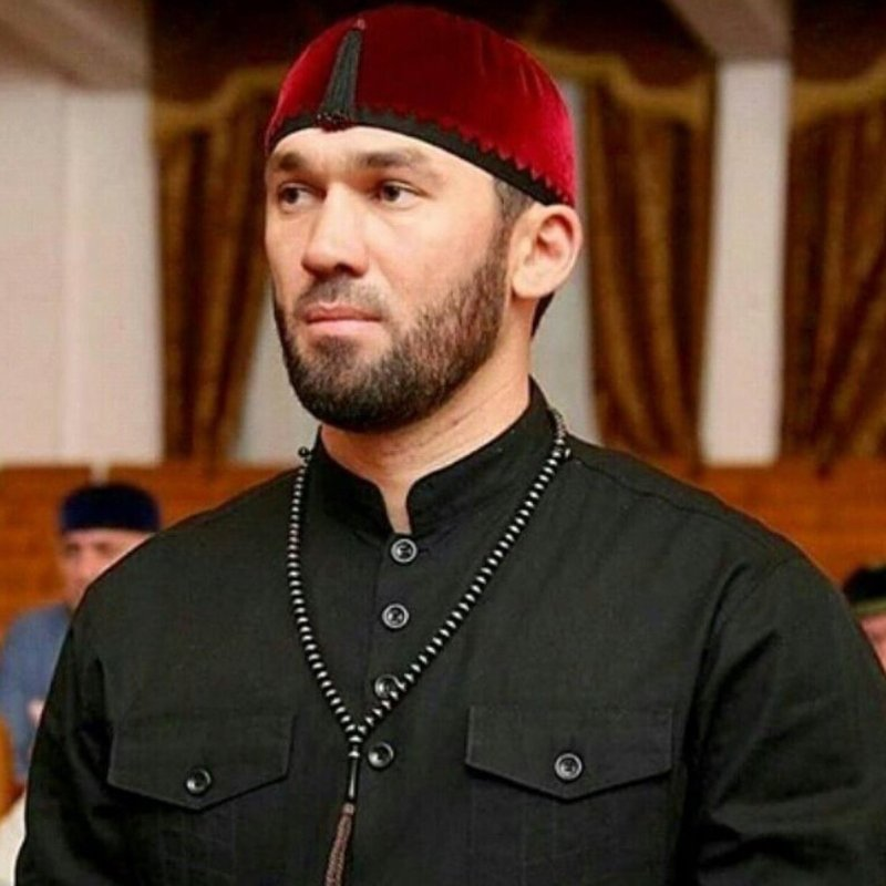 3 июля 2015 года на внеочередном пленарном заседании Парламента ЧР Даудов Магомед Хожахмедович был избран Председателем Парламента Чеченской Республики третьего созыва. This file, which was originally posted to was reviewed on 1 June 2017 by the administrator or reviewer Daphne Lantier, who confirmed that it was available there under the stated license on that date.